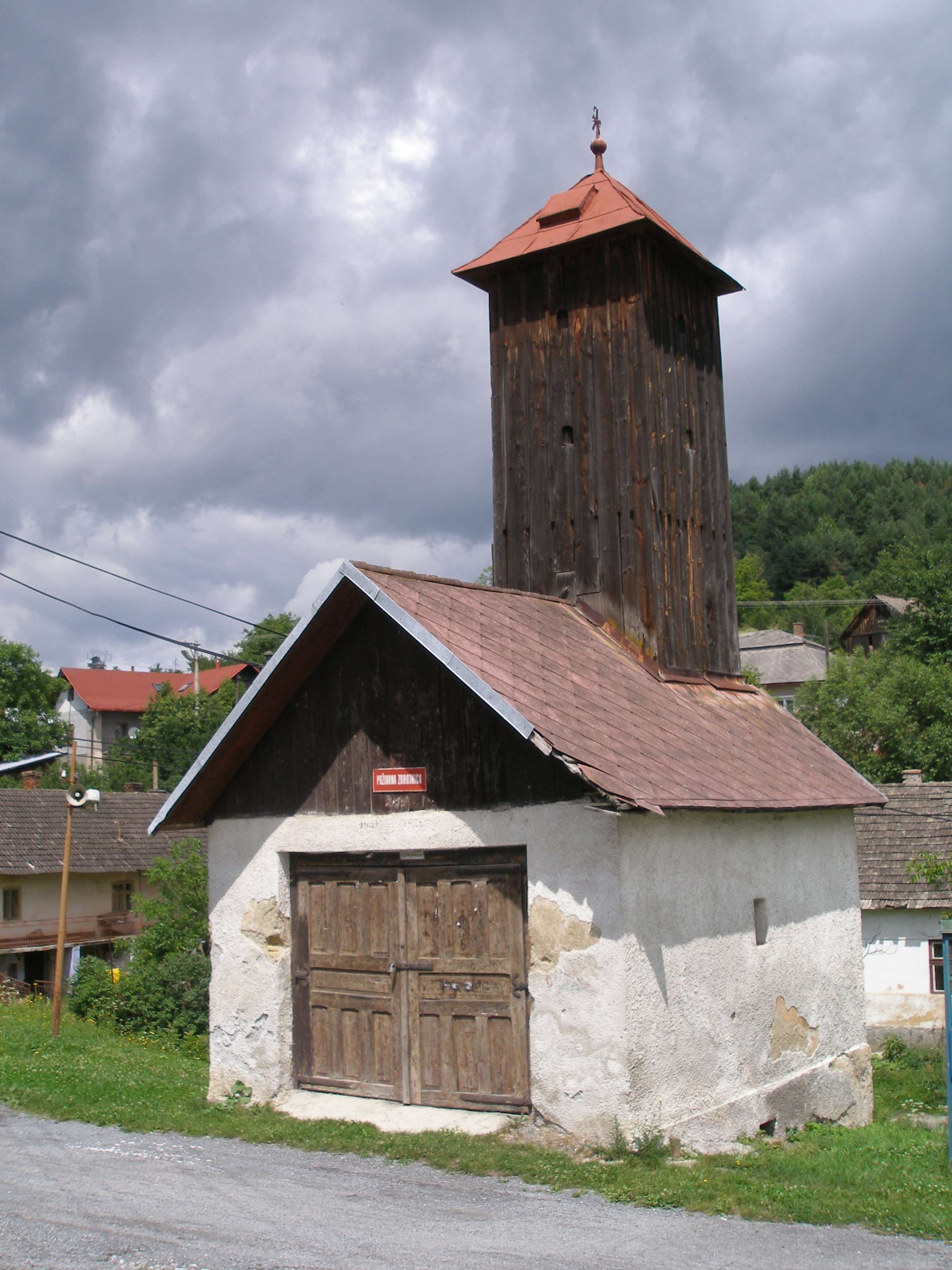 Klenov obec v Šarišskej vrchovine, okr.Prešov, región Šariš